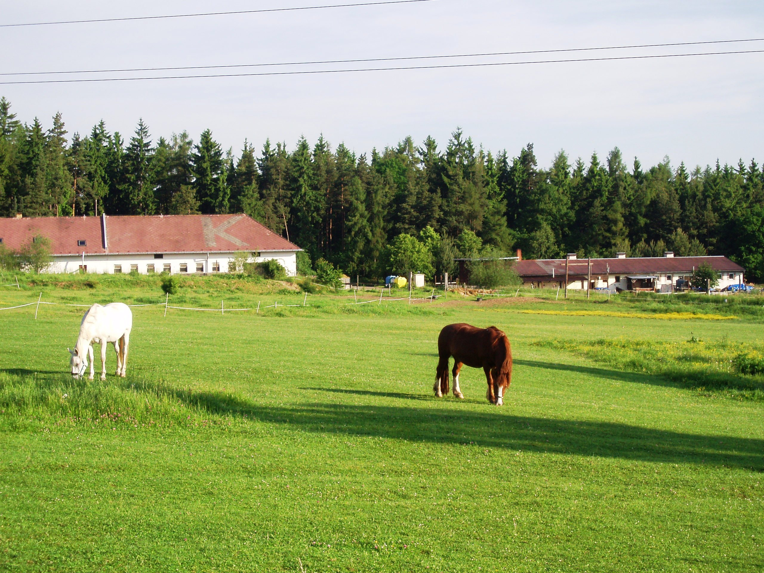 FFFarma v Žežicích